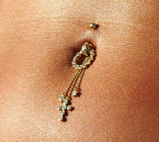 Пъпът е силно ерогенна зона